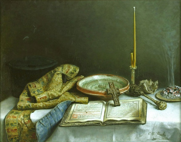 Constantin Dimitrie Stahi - Natură moartă – Apă sfinţită (Holy water) - oil on canvas - 60 x 75 cm - Muzeul Naţional de Artă